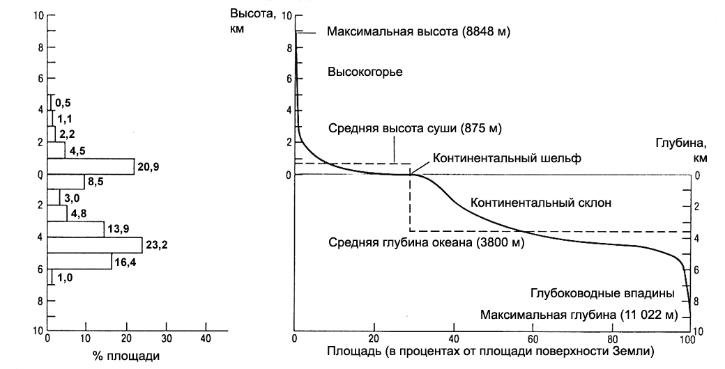 Гистограмма высот и глубин и гипсографическая кривая для рельфа Земли